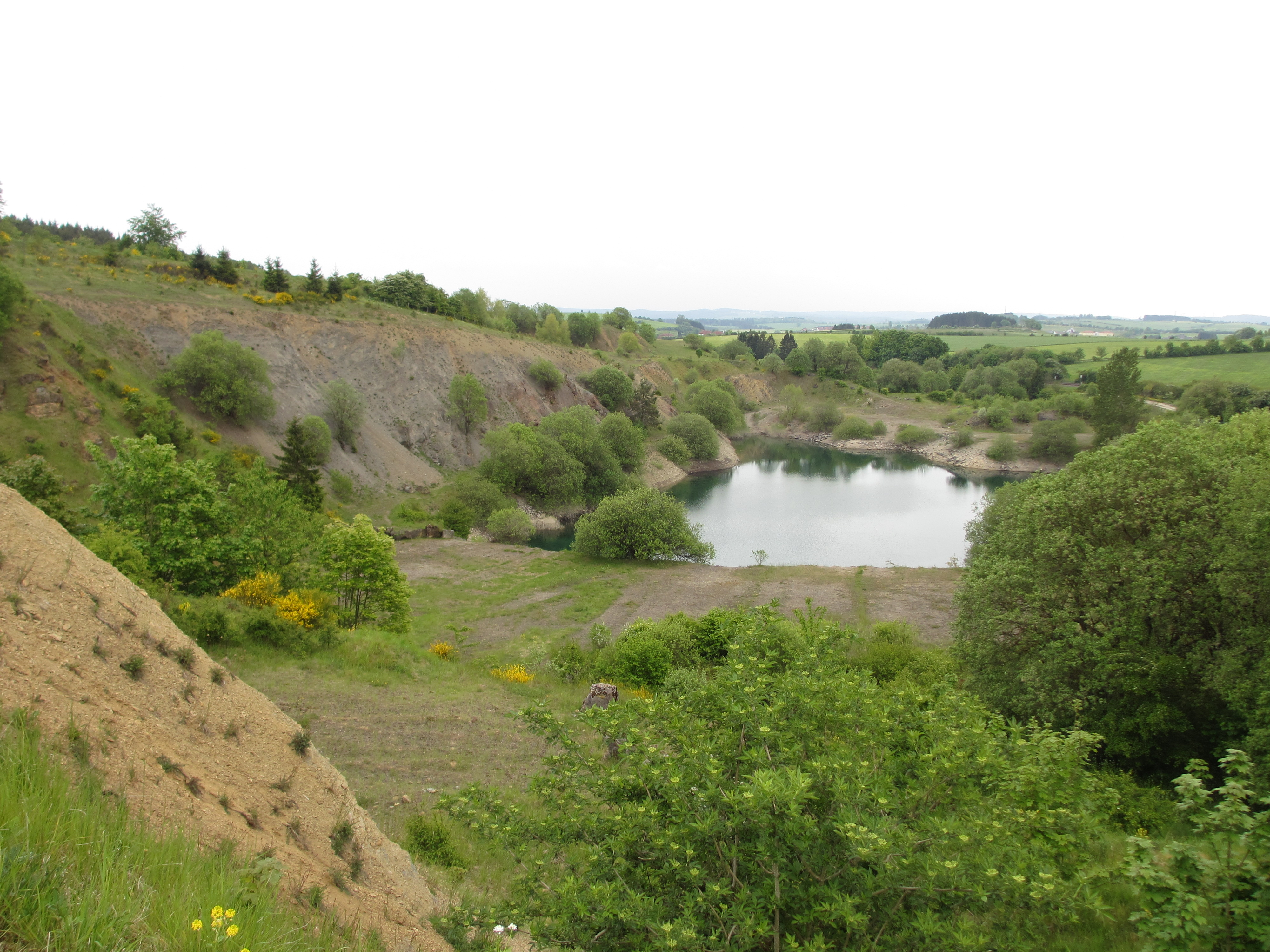 Ehemaliger Steinbruch im NSG „Ehemalige Steinbrüche am Soensberg, Lanzenberg und Kaucherbachtal“. Blick von Westen. Rechts direkt außerhalb des Bildes verläuft die Bundesstraße B51.